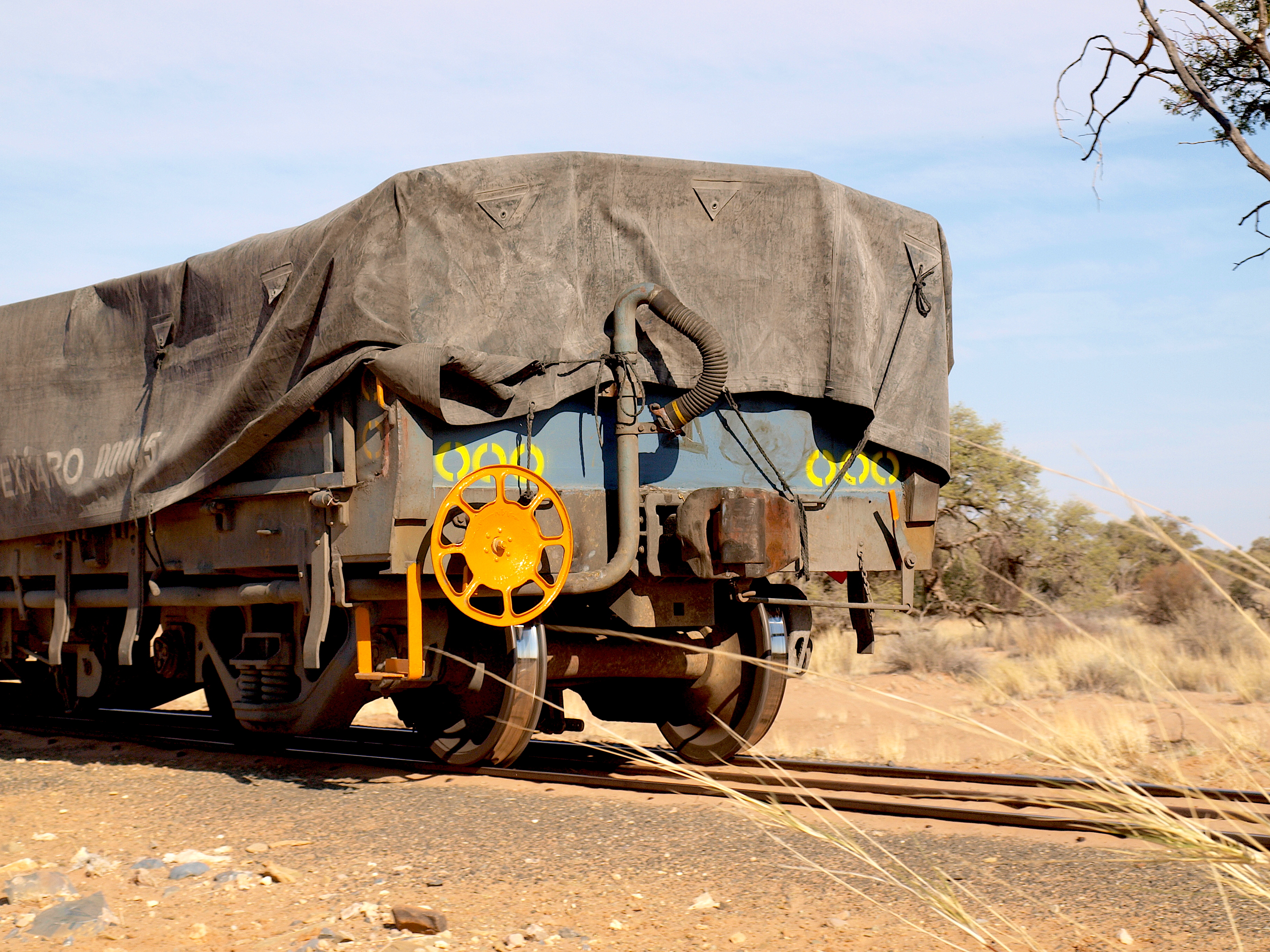 Handbremse eines Güterwages in Namibia (2012)